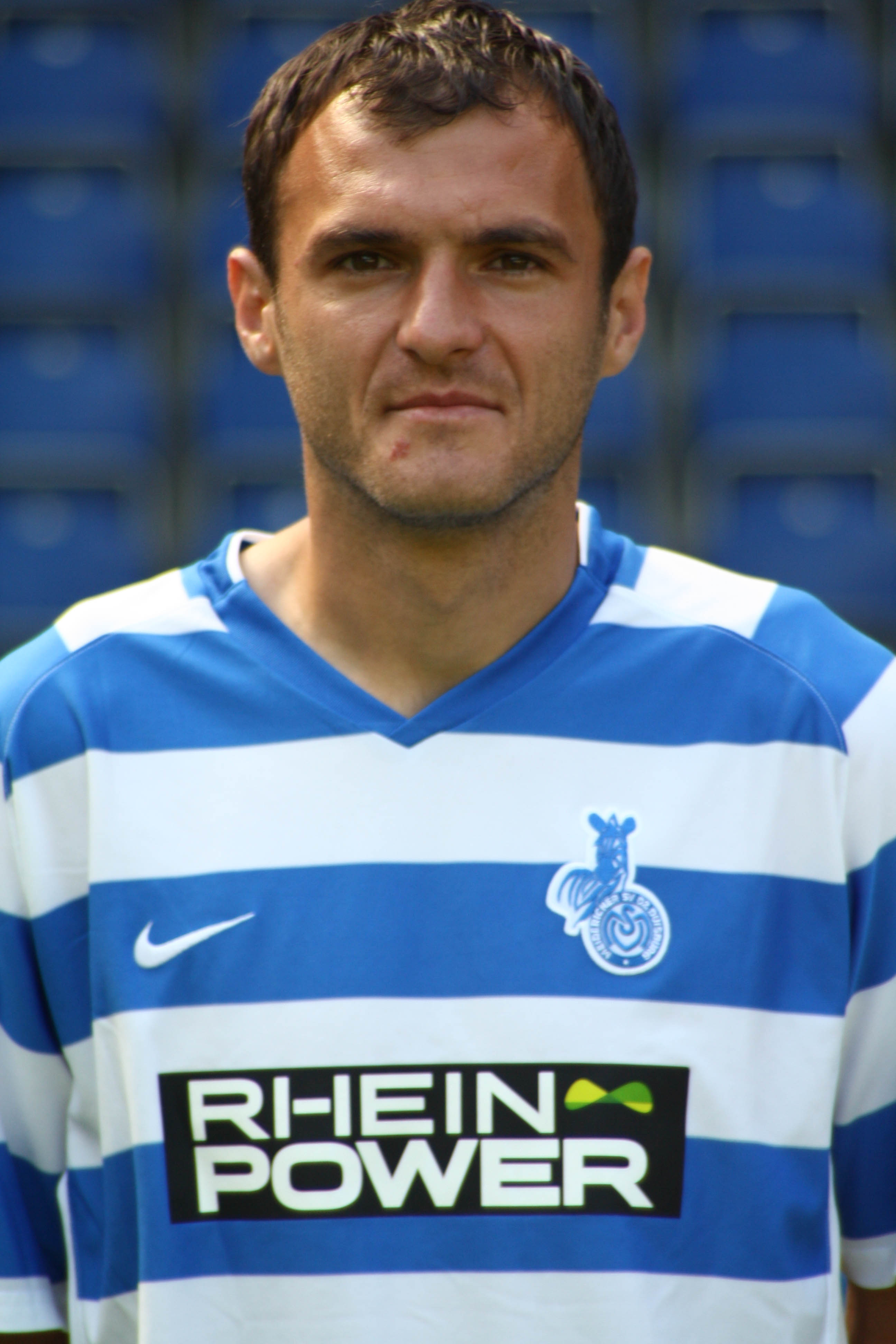 Emil Jula, MSV Duisburg